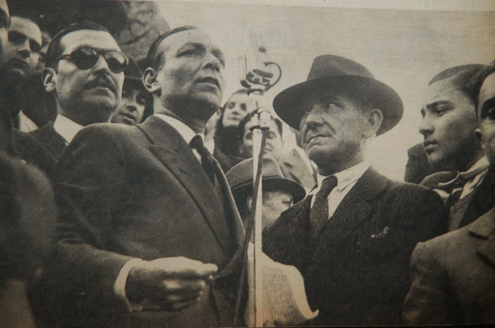 Cipriano Reyes (+/- 1945?). Dirigente sindical argentino.